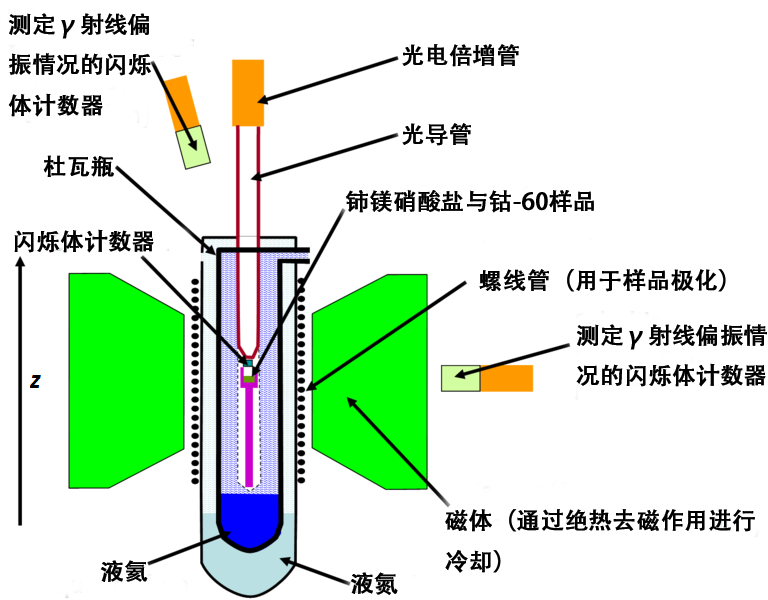 吴健雄验证弱相互作用中宇称不守恒实验所用实验仪器示意图